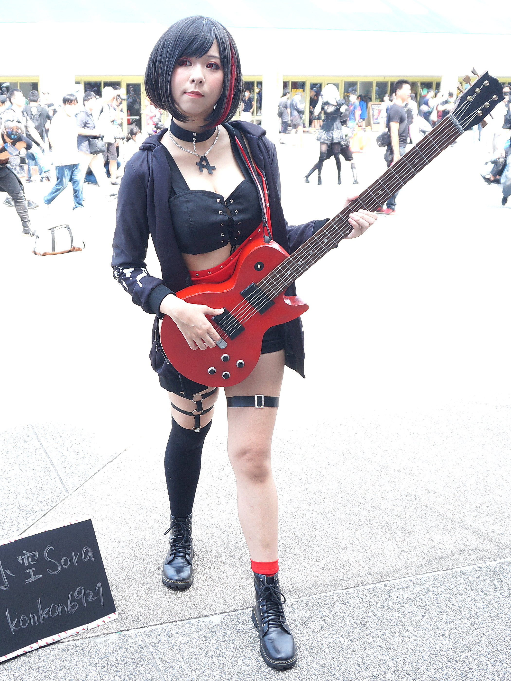 中文（台灣）: 第32屆亞洲動漫創作展，小空cosplay《BanG Dream! 少女樂團派對》美竹蘭。